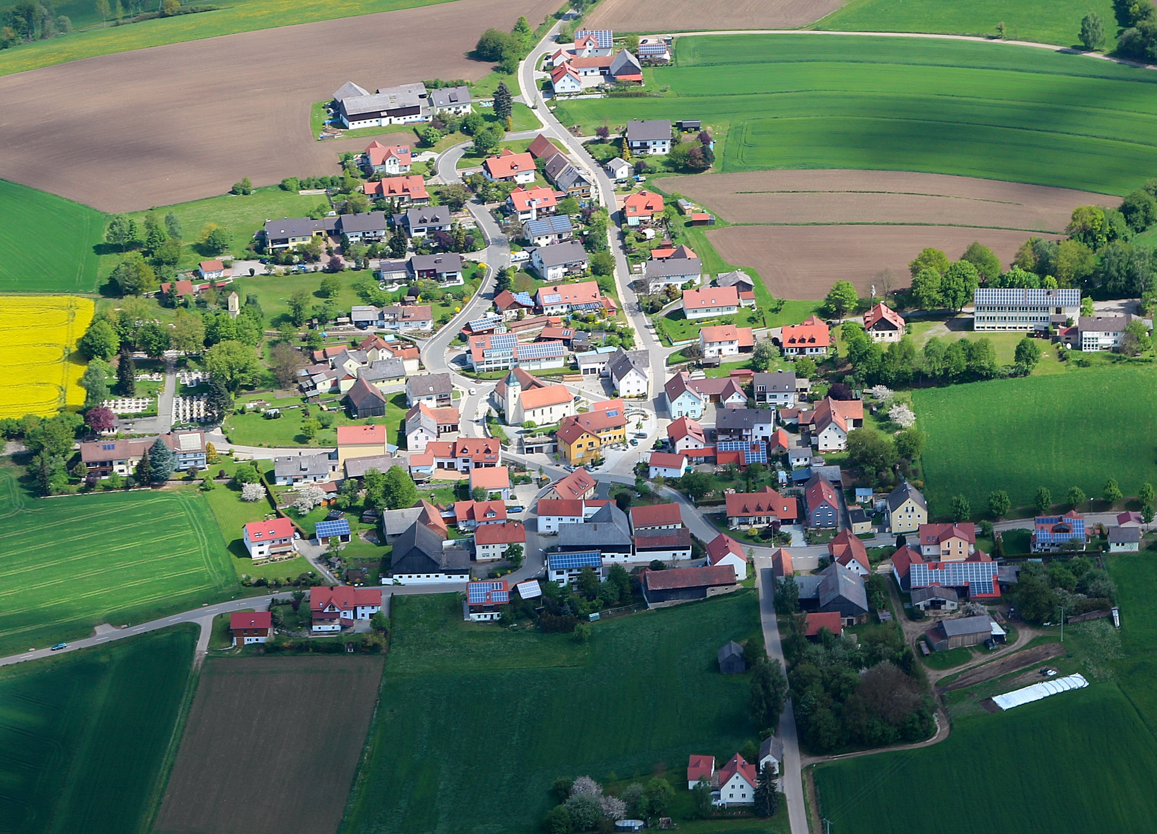 Gleiritsch (Ortskern mit neu gestaltetem Ortskern und Dorfladen), Landkreis Schwandorf, Oberpfalz, Bayern